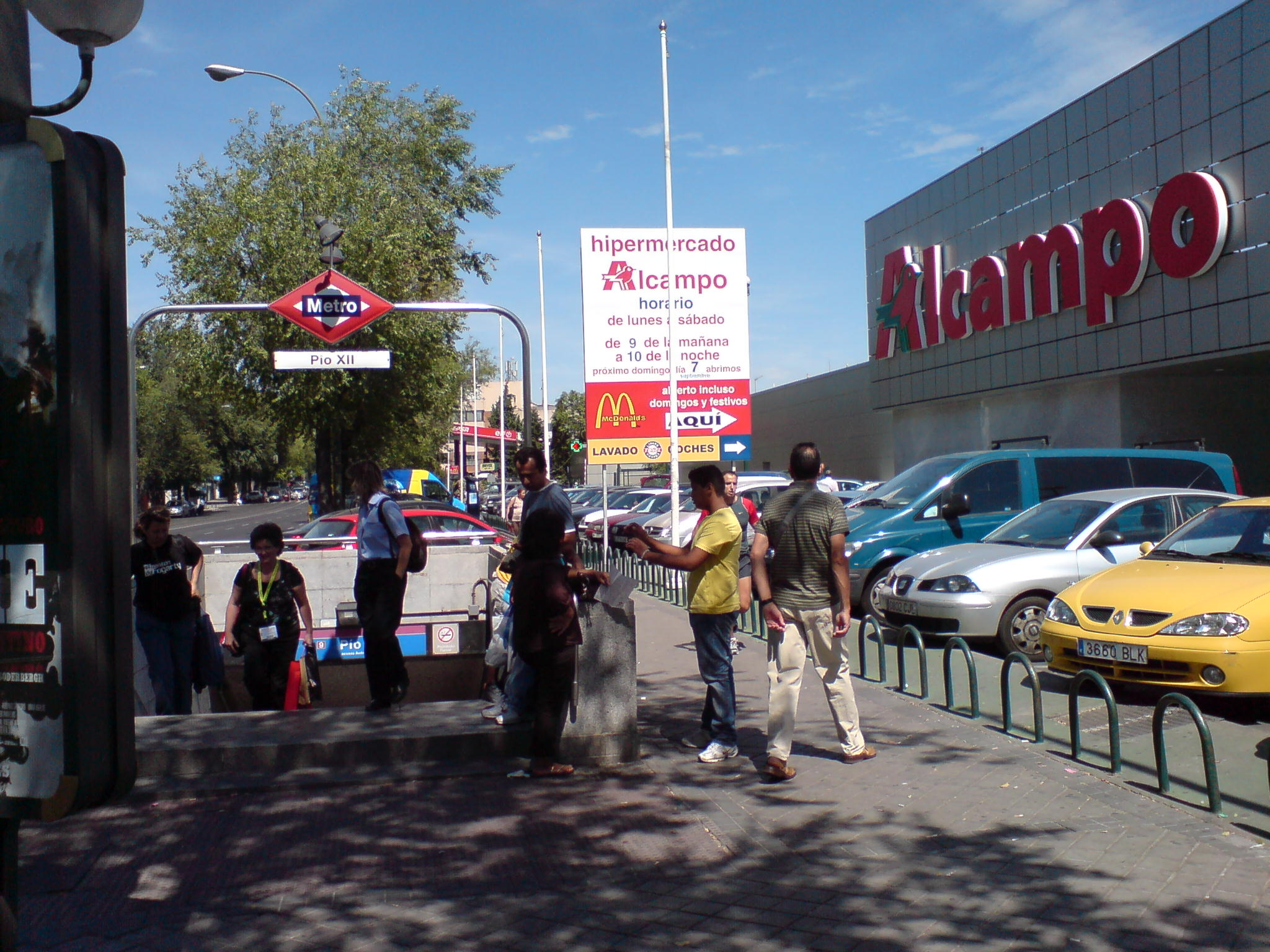 Boca principal e acceso a la Estación de Pío XII, junto al Alcampo Pio XII